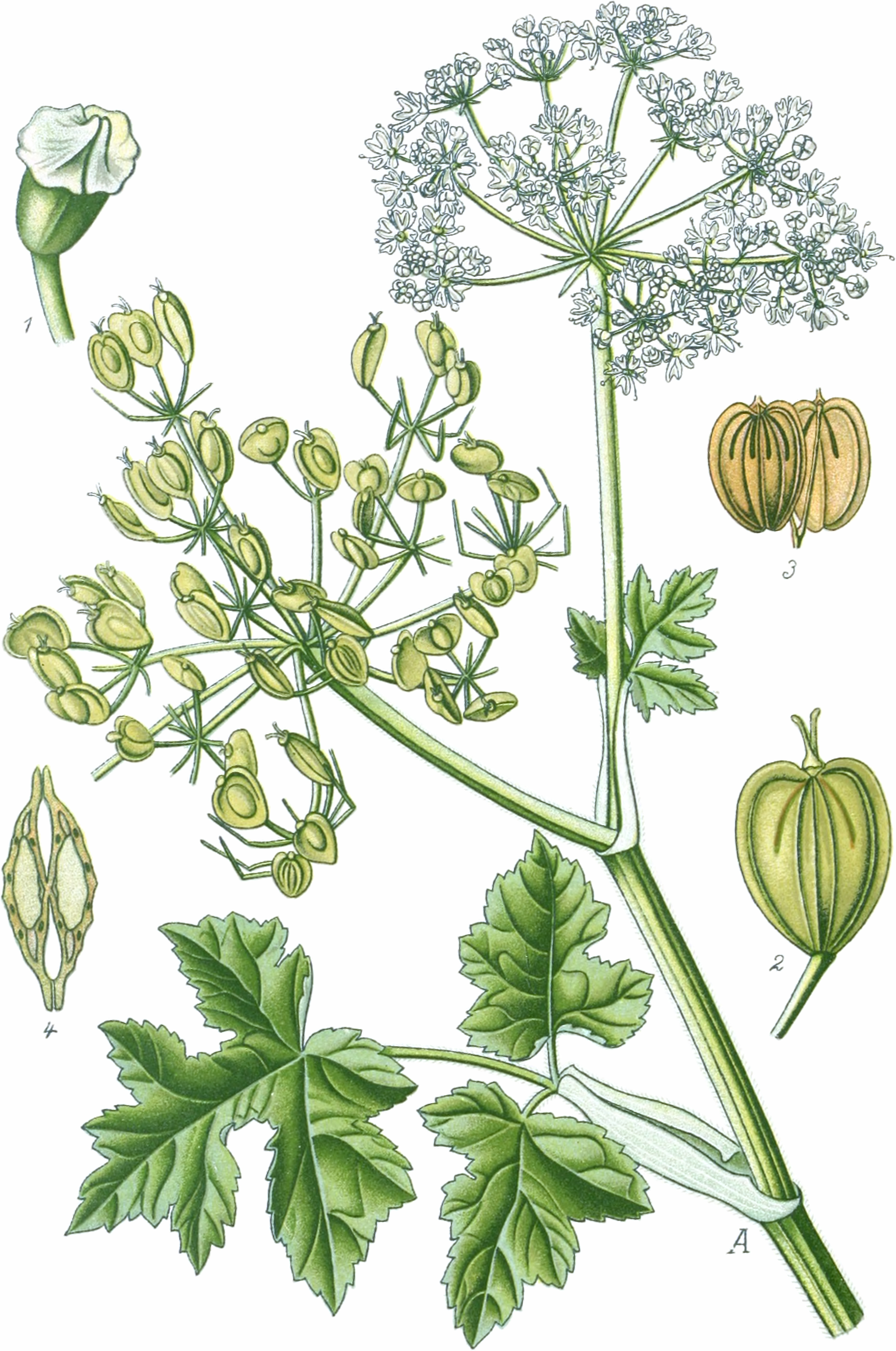 Originalbeschriftung: Tafel 451. Heracleum Spondylium L. A Teil der Pflanze. 1 Stempel; 2 halbreife Frucht; 3 Fruchtträger mit den Früchtchen ; 4 Fruchtquerschnitt. 1 bis 4 vergrössert.